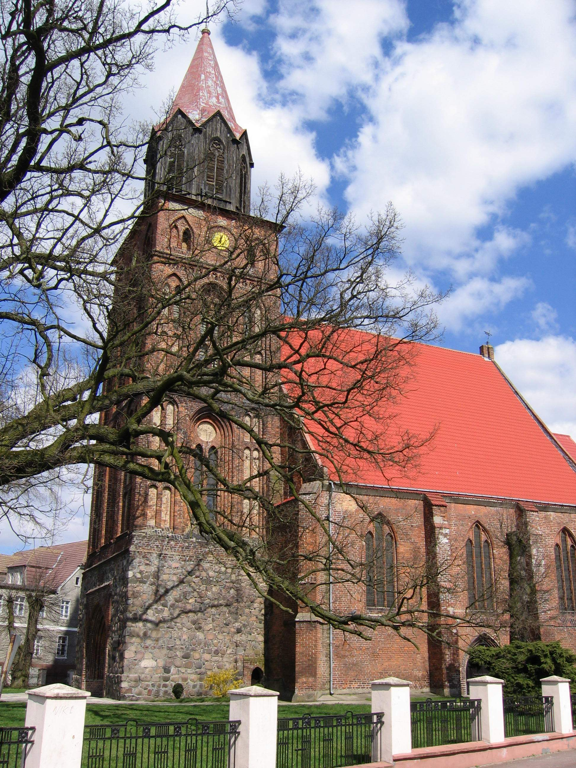 Maszewo - kościół MB Częstochowskiej